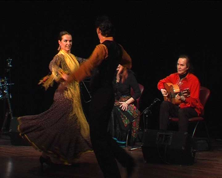 danseur et danseuse